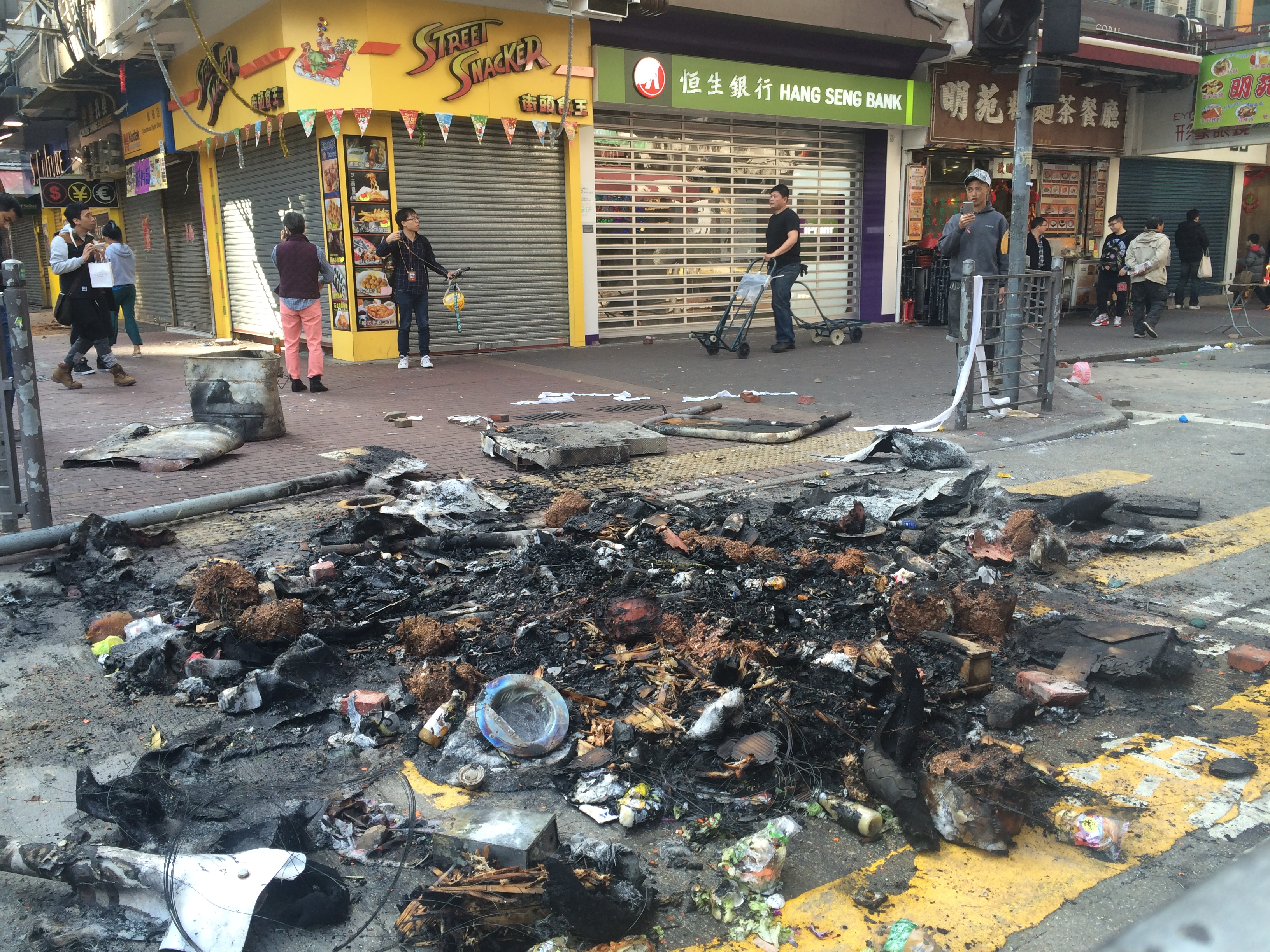 旺角騷亂後，示威者燃燒雜物後在街道上留下的殘骸。